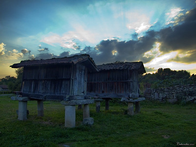 Los horreos son elementos tradicionales de la arquitectura galega relacionada con la agricultura. En As Quintás, no es diferente. Pero el paso del tiempo es evidente y el abandono del rural, palpable.